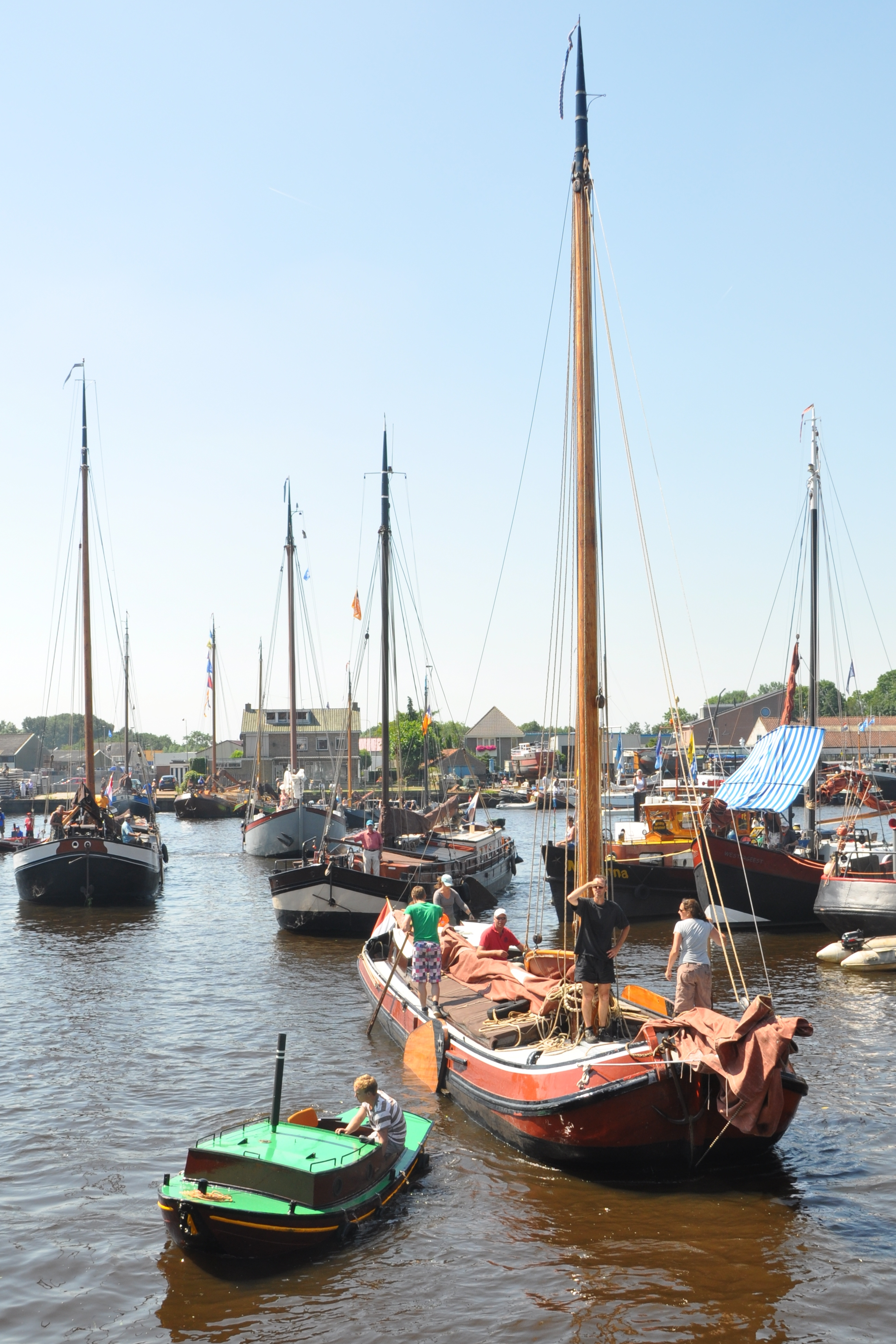 De GUDSEKOP uit 1908 bij de reunie 2012 van de LVBHB in Hasselt